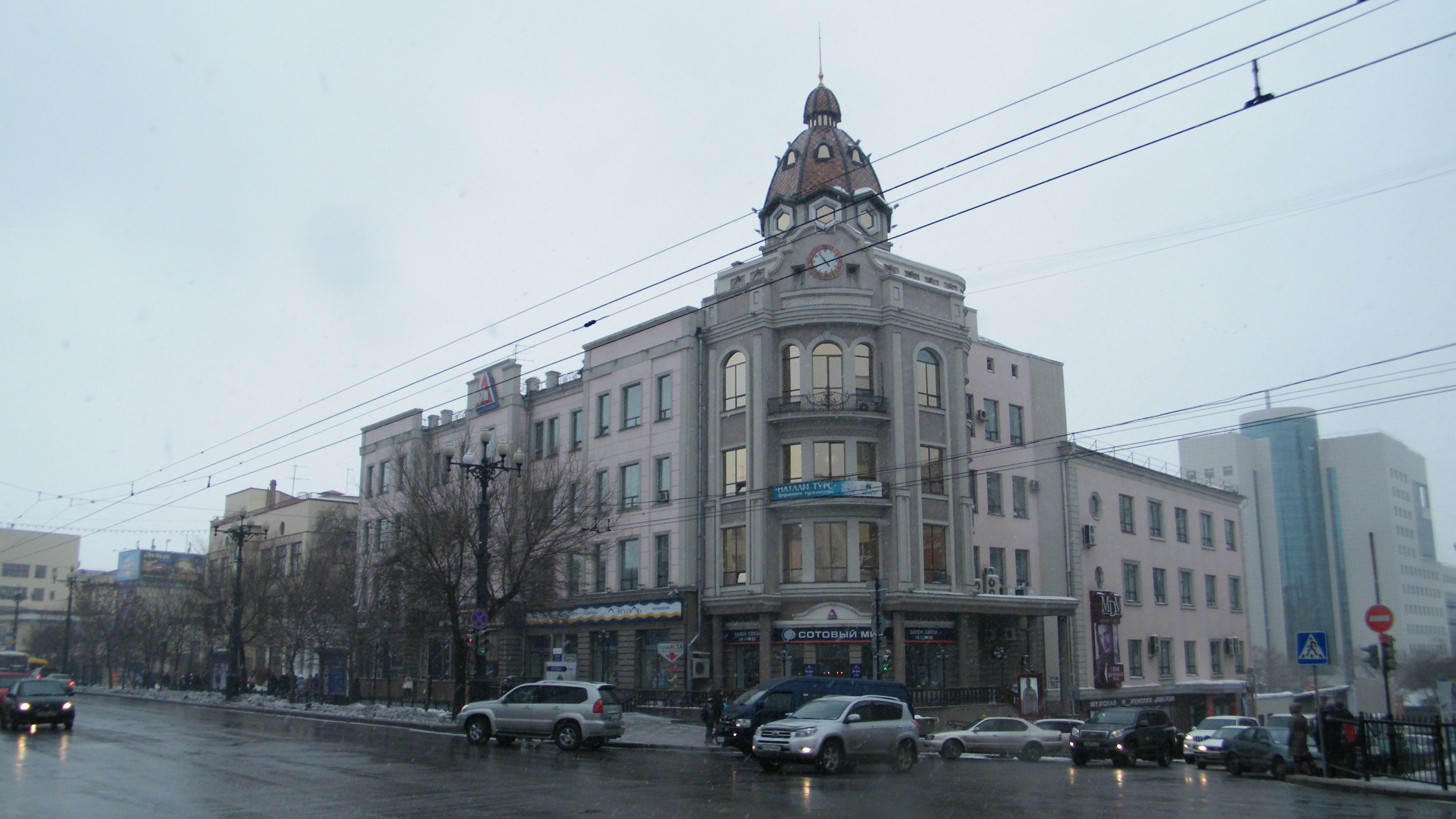 Хабаровск, здание ГУМа, ул. Муравьёва-Амурского 23, бывший доходный дом А. К. Архипова (1914).